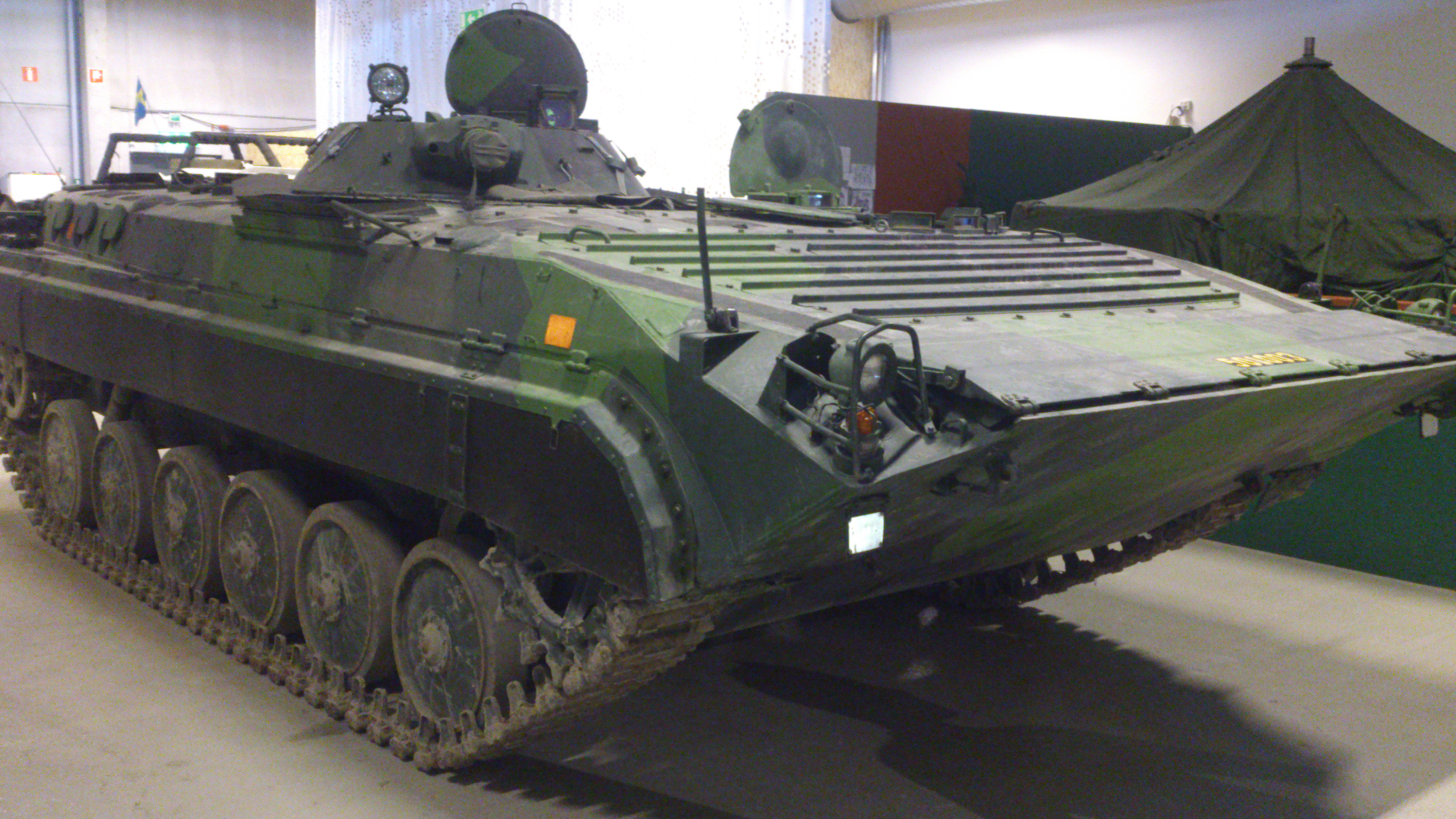 Pansarbandvagn 501 på Försvarsfordonsmuseet Arsenalen i Strängnäs